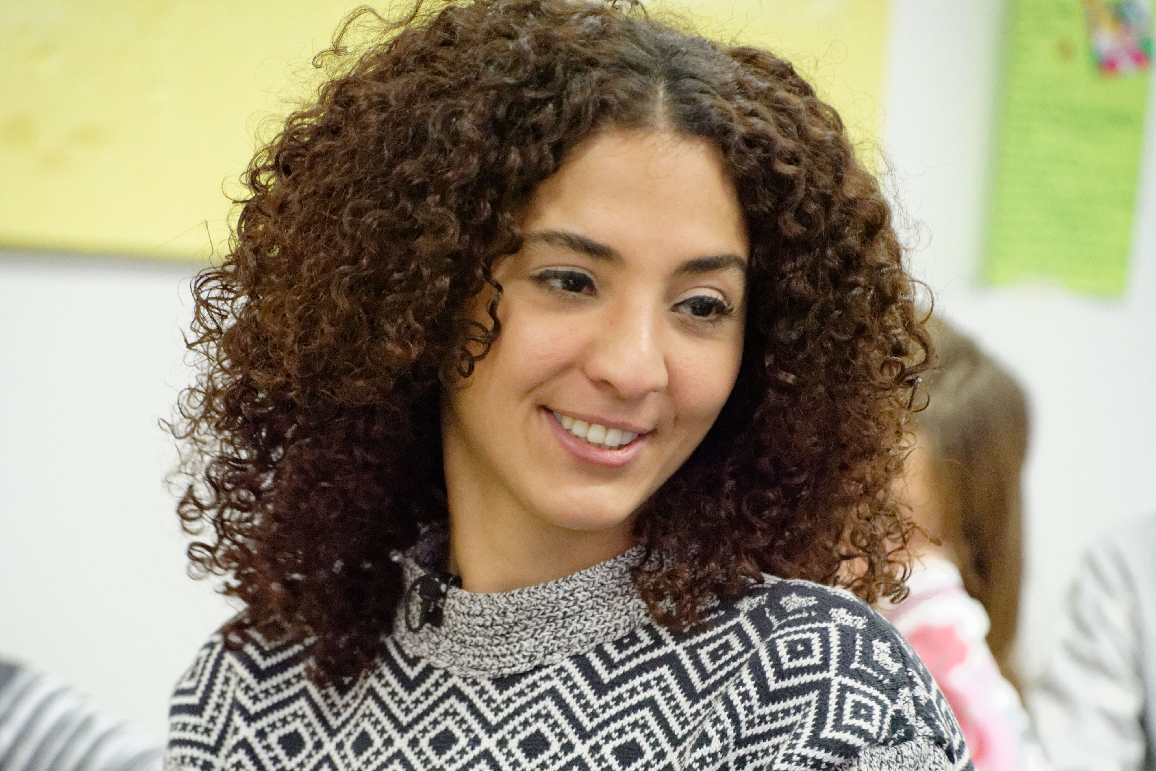 Siham El-Maimouni bei Dreharbeiten am Freiherr vom Stein-Gymnasium Leverkusen